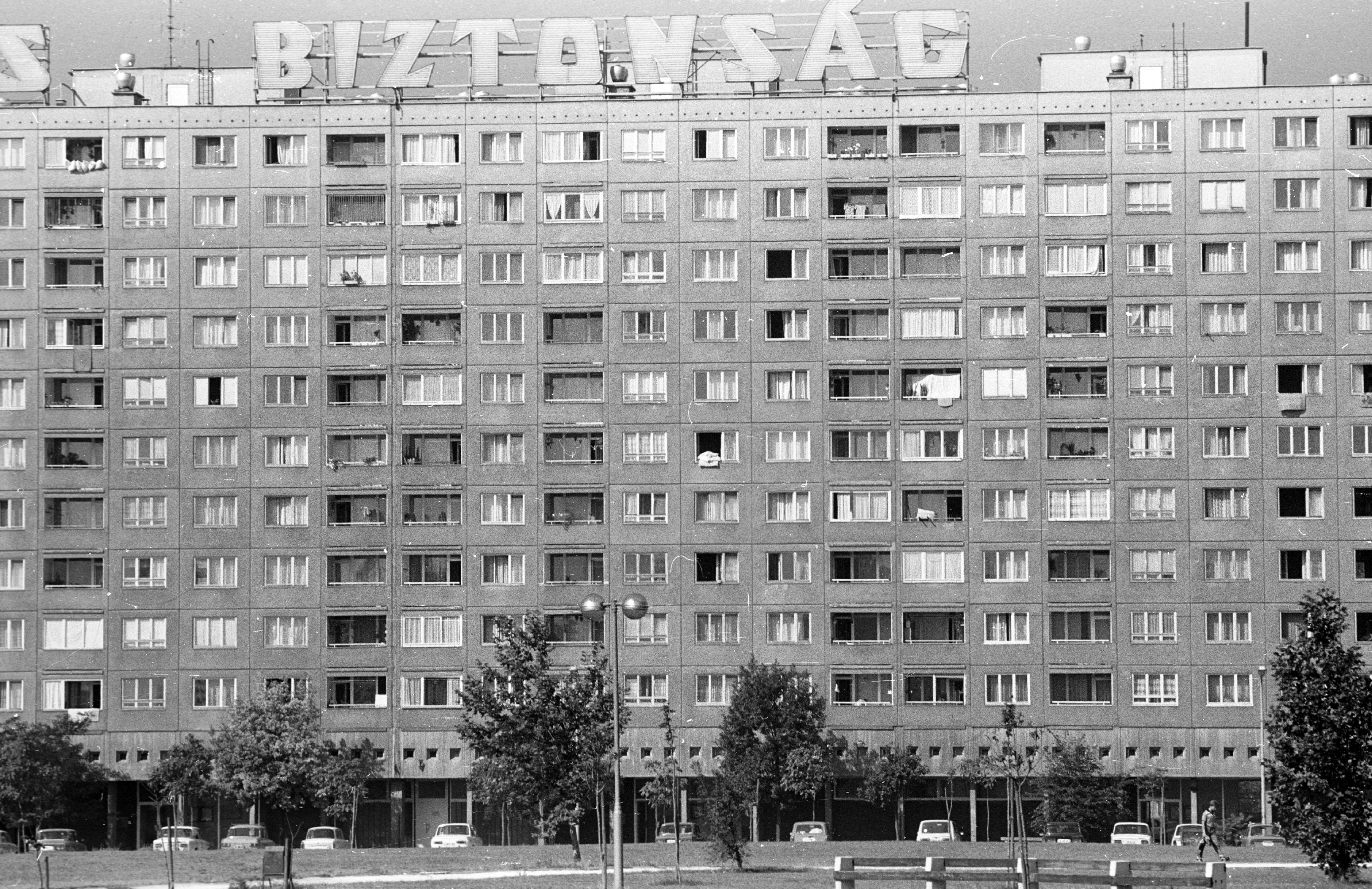 Szőlő utca 72-74. (Faluház részlete). Location: Hungary, Budapest III., Óbuda Tags: Budapest Title: Szőlő utca 72-74. (Faluház részlete).